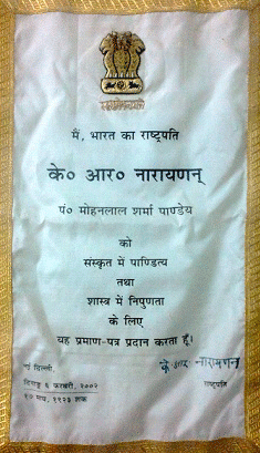 Pt. M.L.S Pandeya received ‘President Award’ from Honorable President of India (1997-2002).